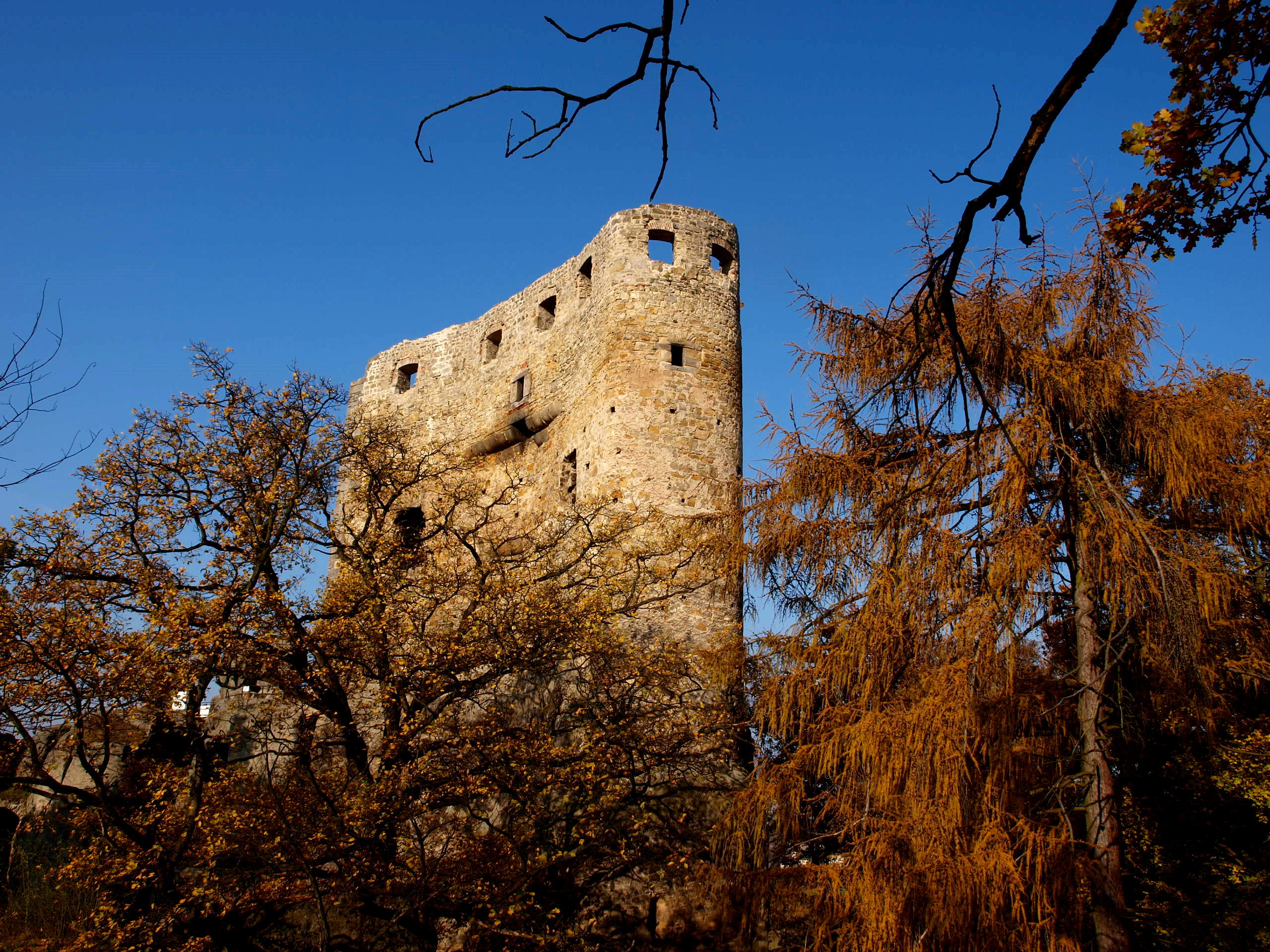 Hradby hradu Valečov